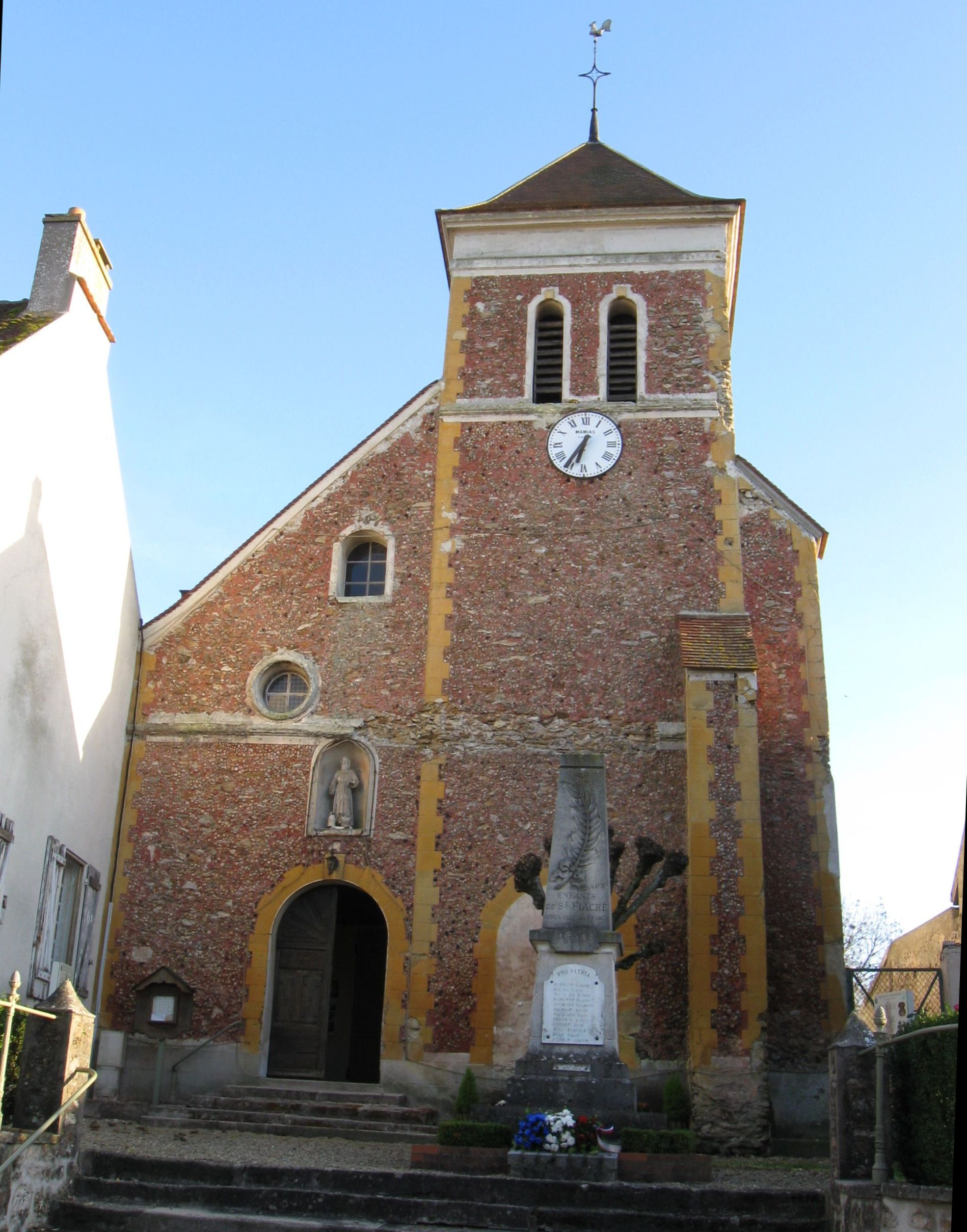 Église Saint-Fiacre de Saint-Fiacre. (Seine-et-Marne, région Île-de-France).